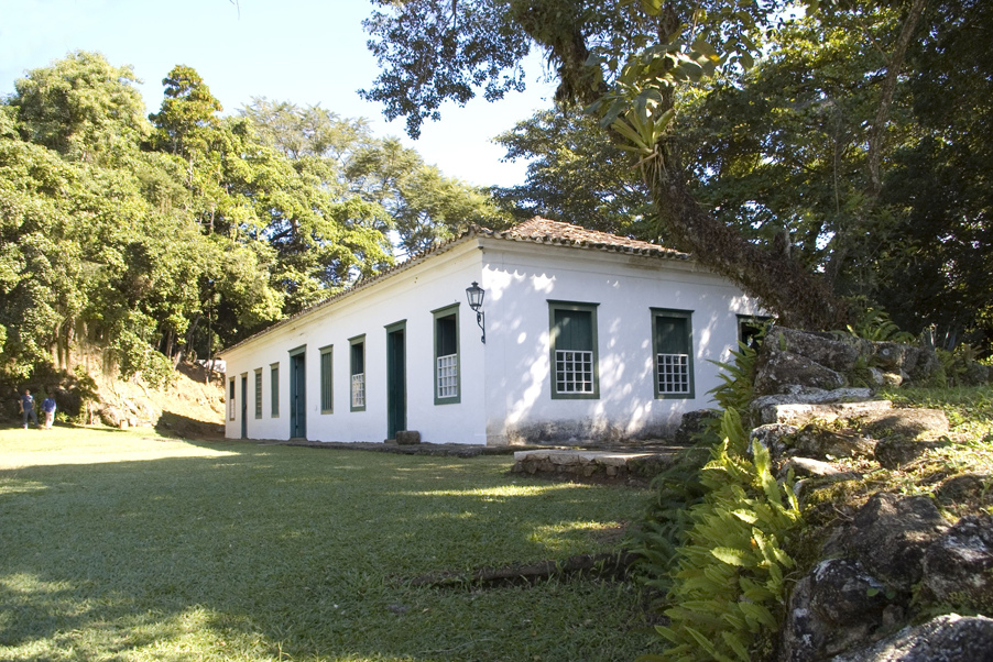 Endereço: Morro do Forte, S/Nº – Centro Histórico – Paraty – RJ. Tel: (24) 3373 1038 Horários: de terça a sexta, das 9h às 12h, e das 13h às 17h; aos sábados e domingos das 9h às 12h e das 14h às 17h. Às terças e domingos a entrada é gratuita Foto: Divulgação IBRAM migre.me/cJCxT